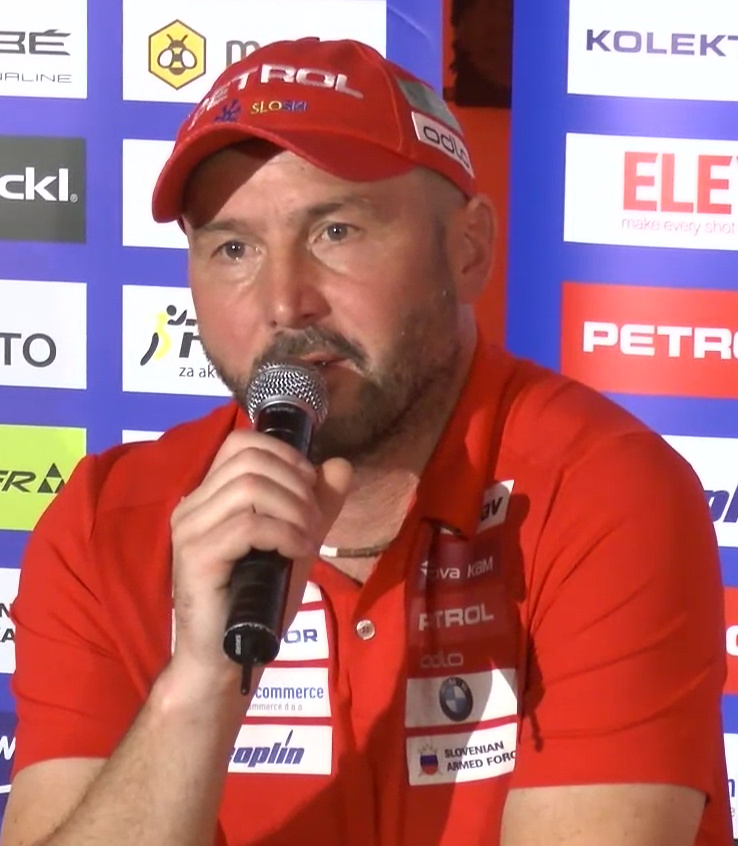 Tomaš Kos